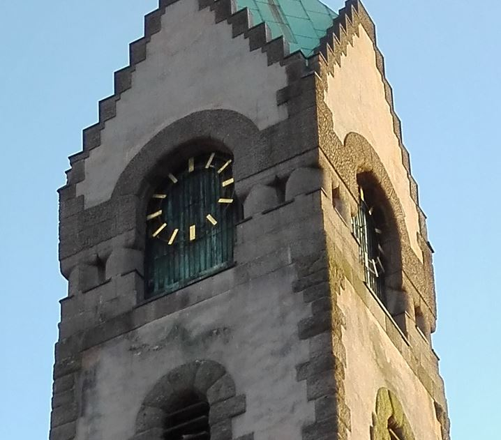 Ansichten der Lutherkirche im August 2017